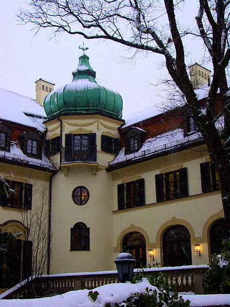 Hildebrandhaus in Muenchen-Bogenhausen